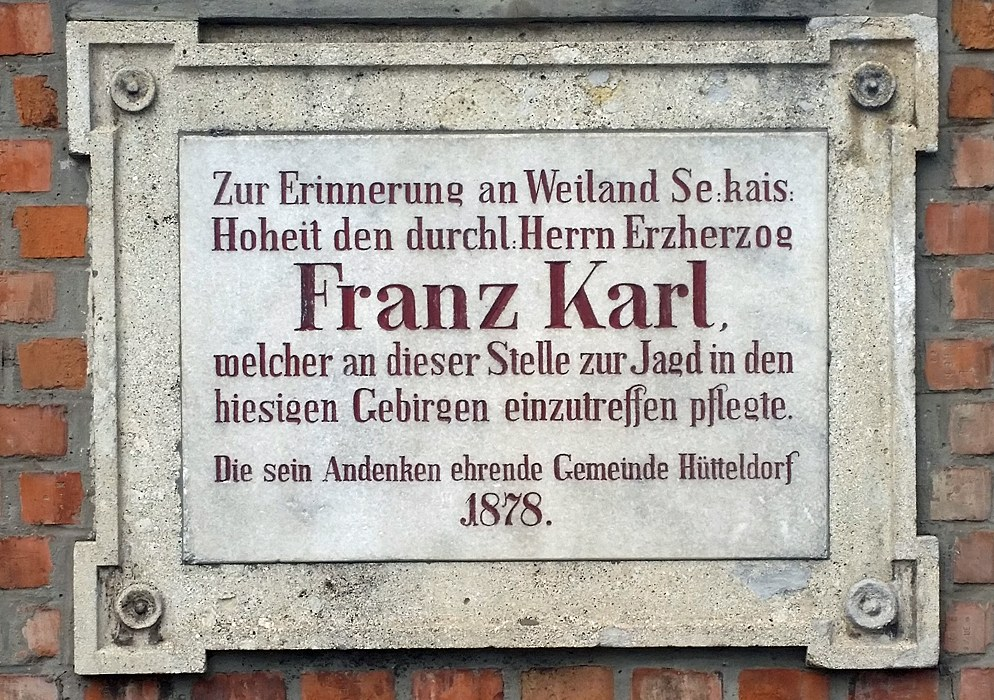 Gedenktafel für Erzherzog Franz Karl in Wien-Hütteldorf